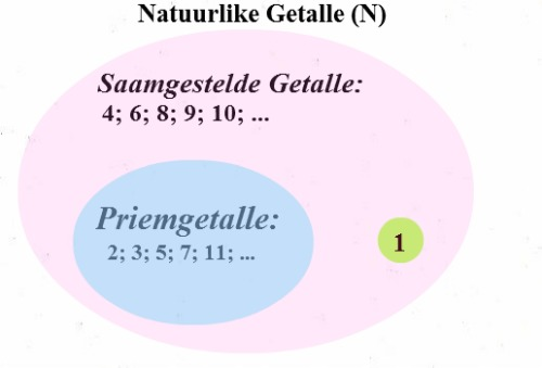 Natuurlike getalle